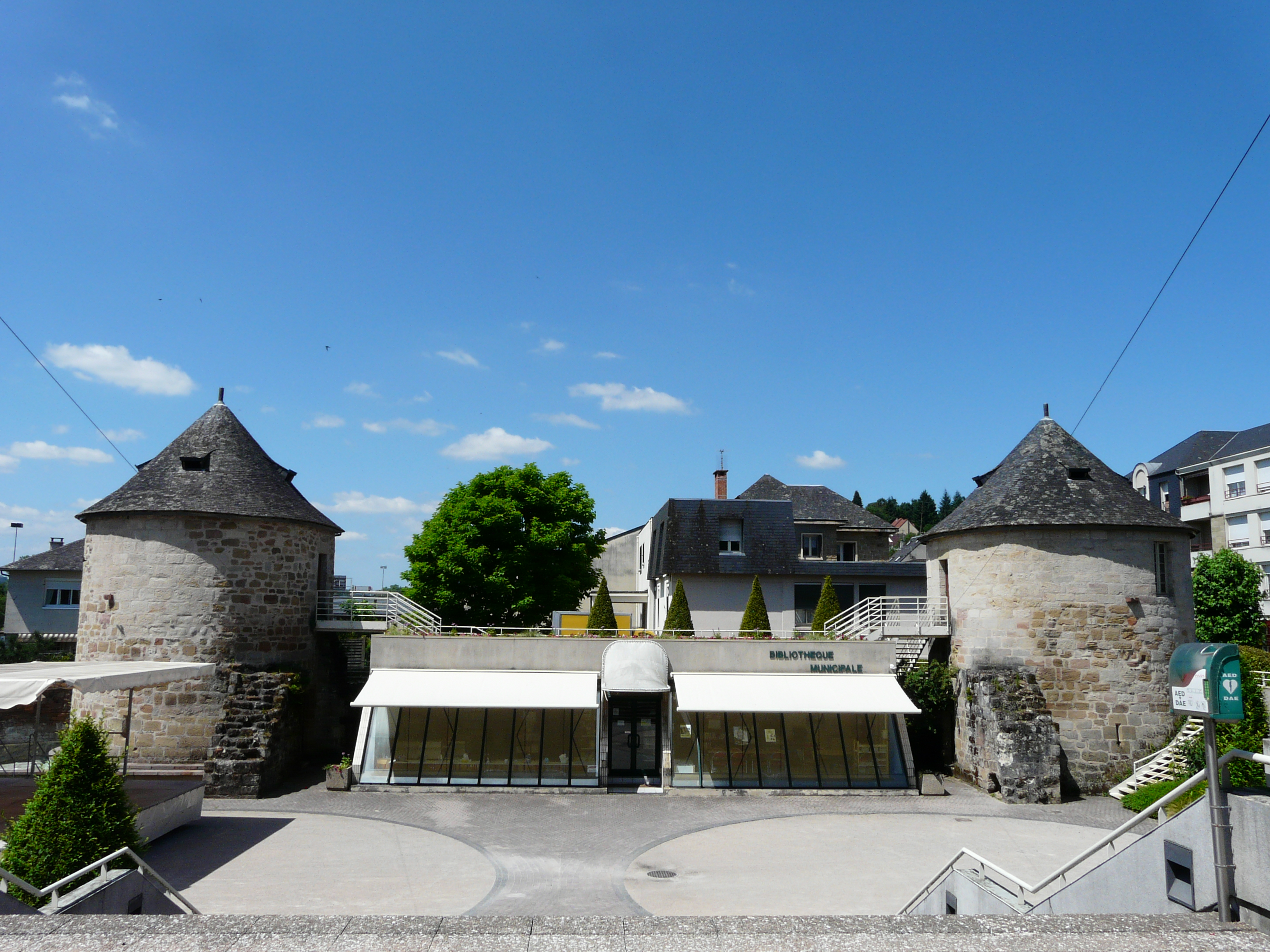 De part et d'autre de la bibliothèque municipale, les deux tours subsistantes du château de Breniges, Malemort-sur-Corrèze, Corrèze, France.